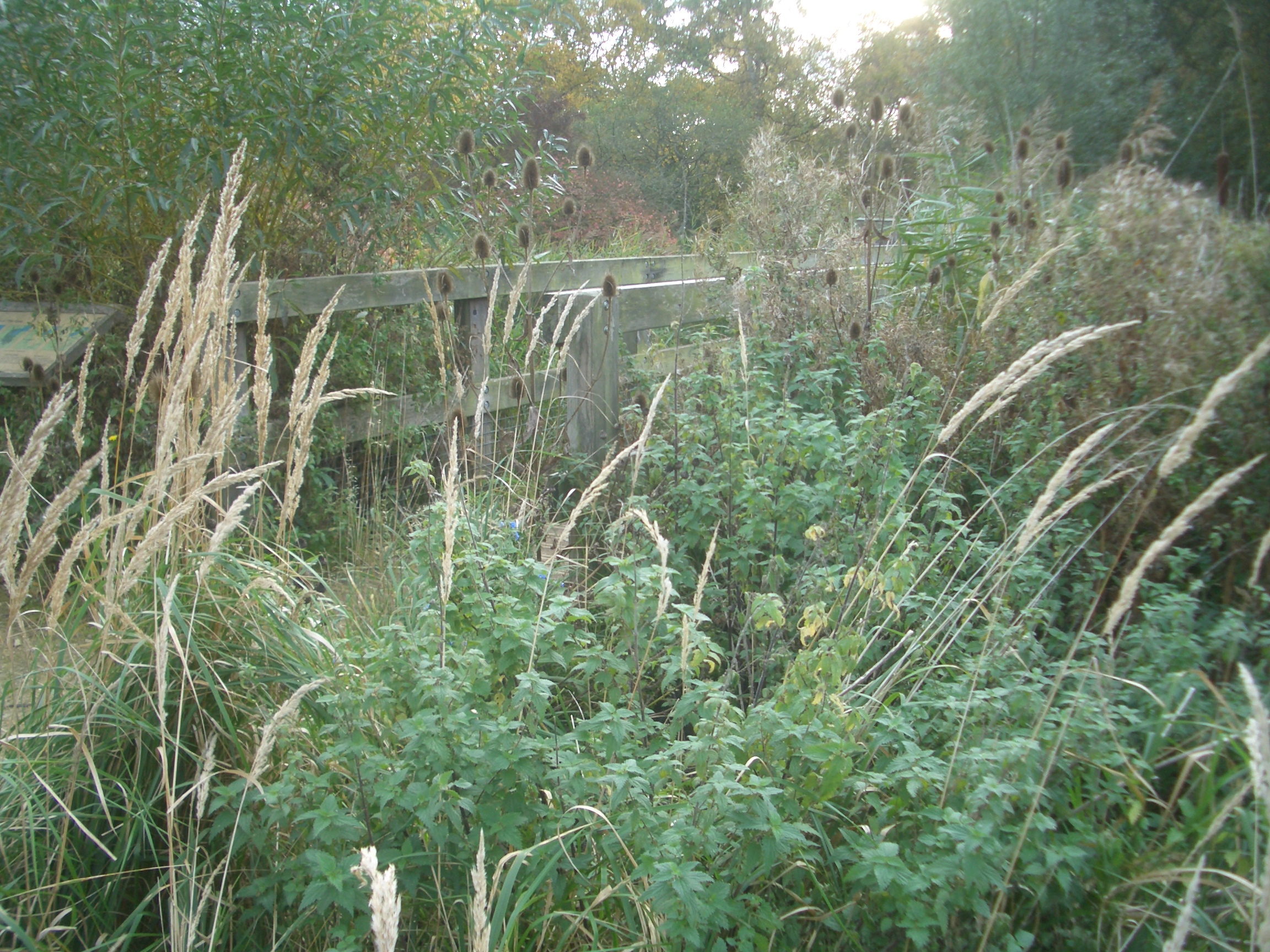 Fenlandgarden im Botanischen Garten der Universität Cambridge, Cambridgshire, England